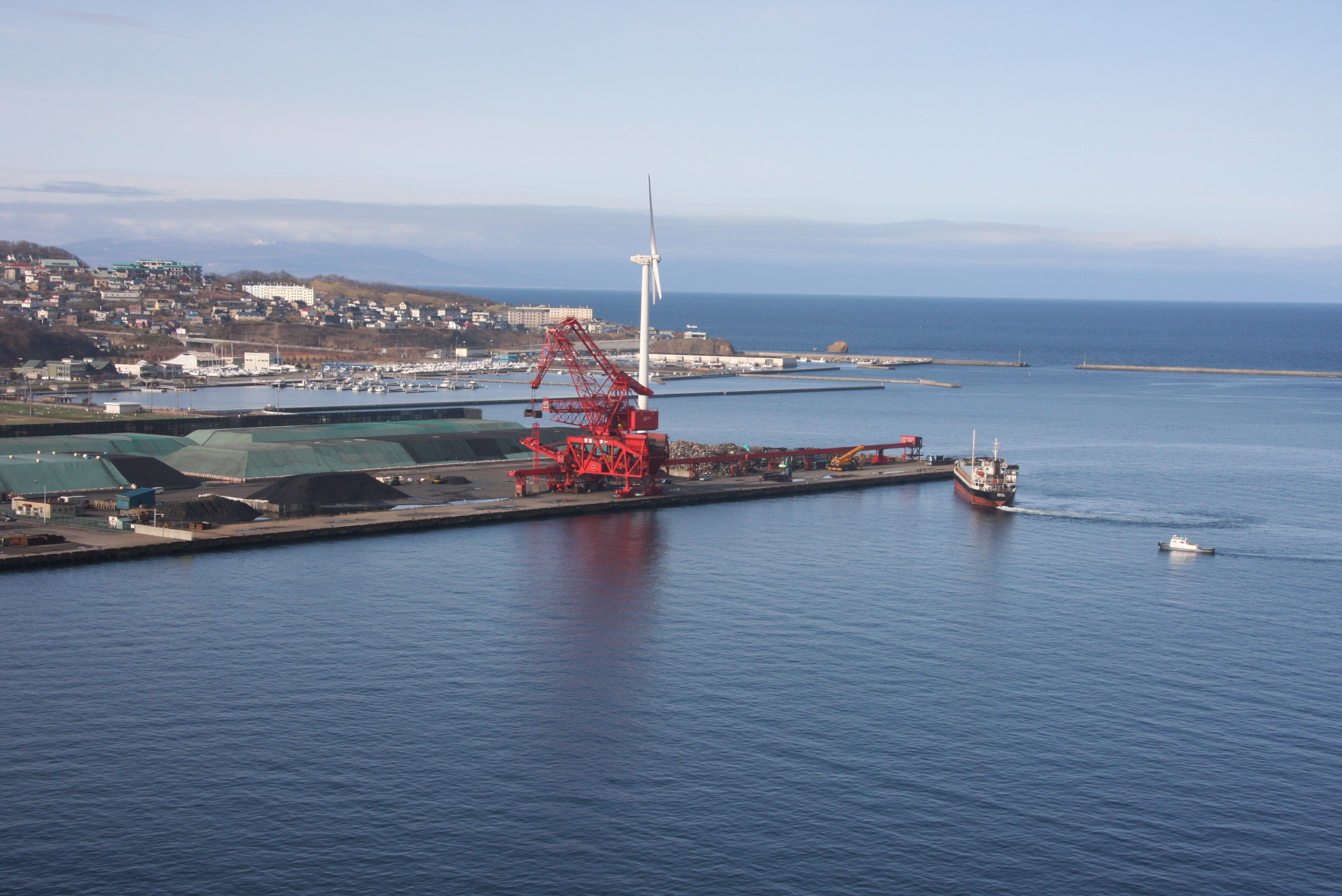 むろらん温泉とエンルムマリーナ